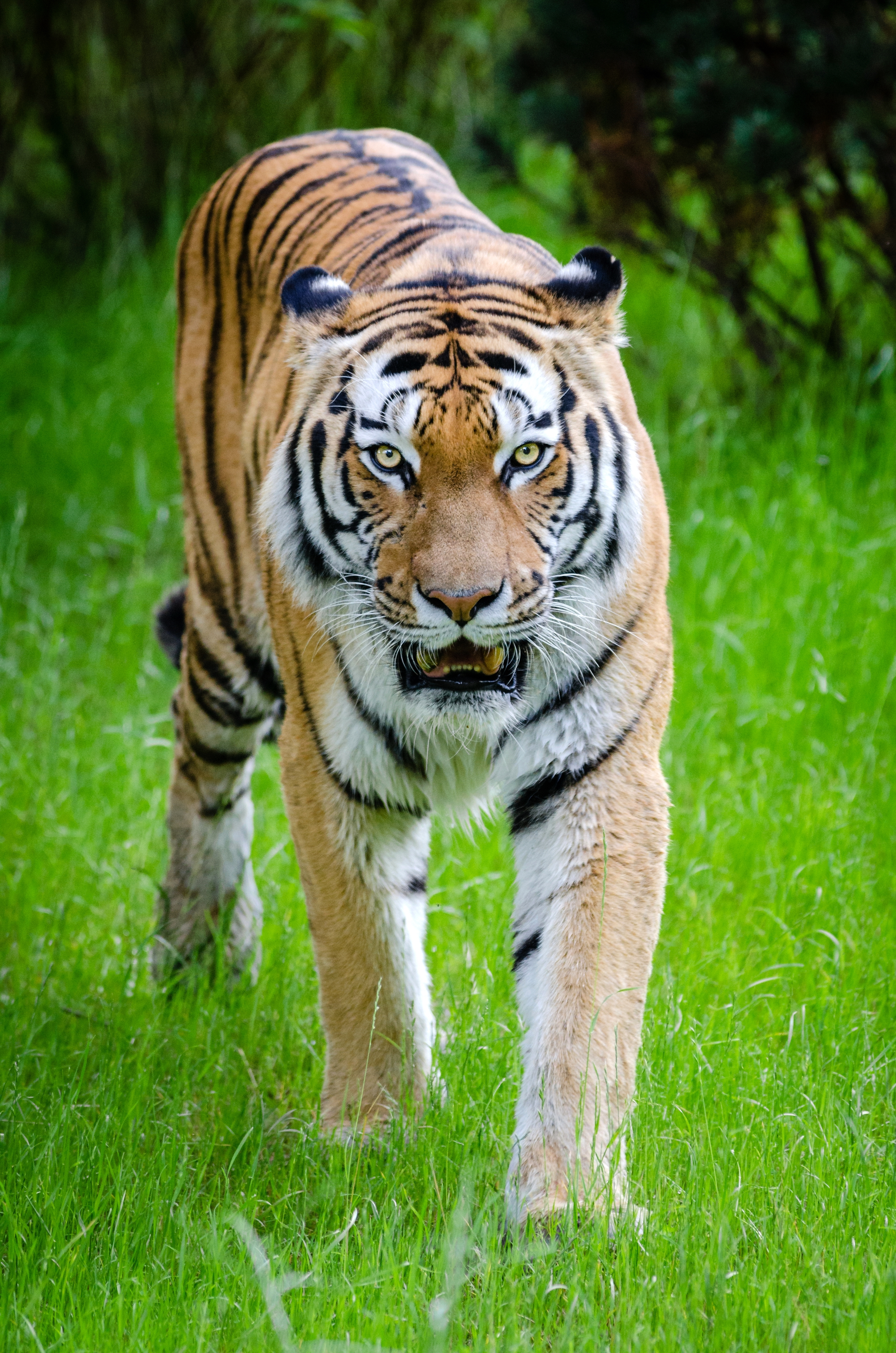 Siberian Tiger